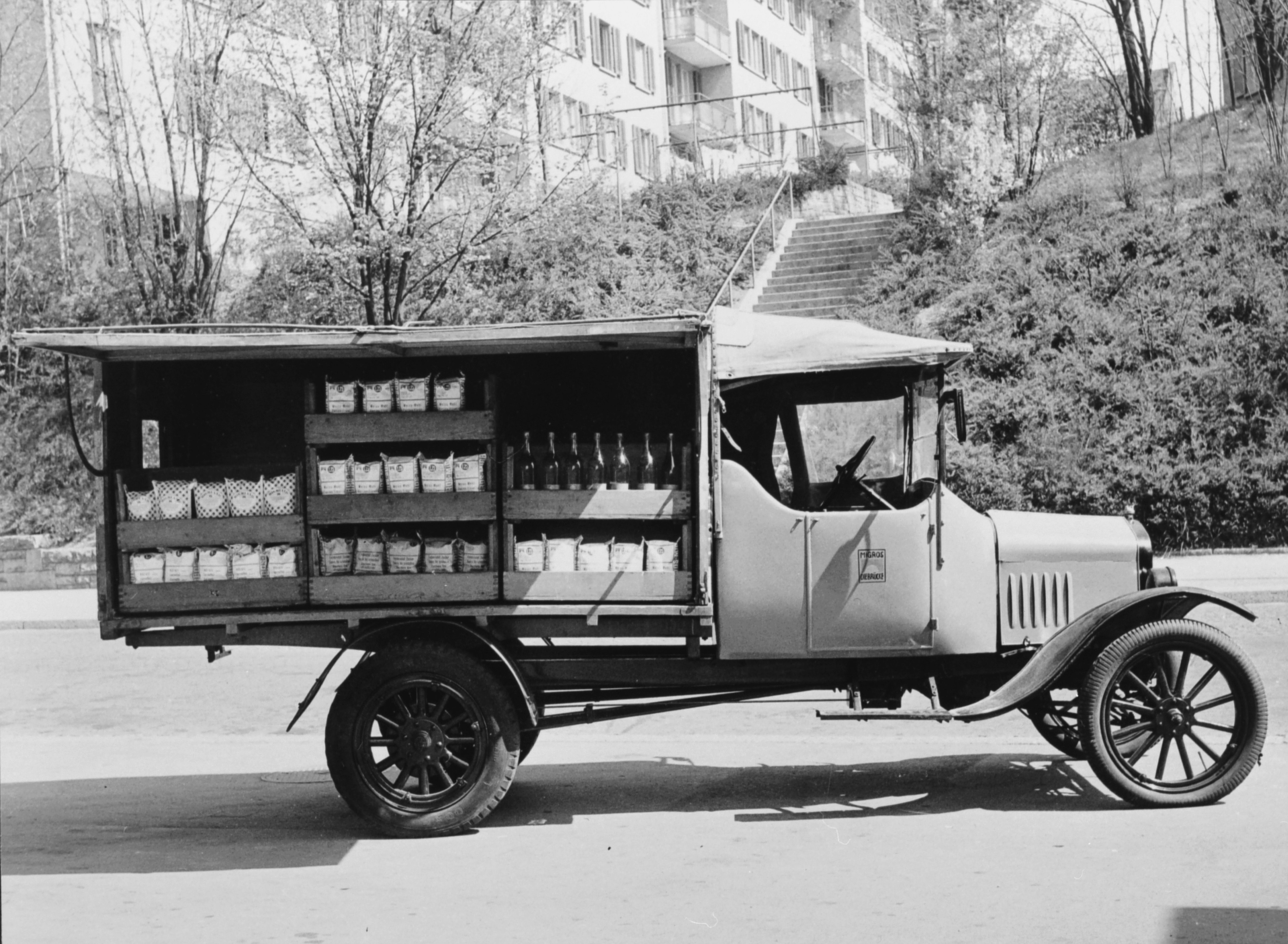 Migros-Verkaufswagen Ford-T, seitlich geöffnet, erste Migros-Produkte